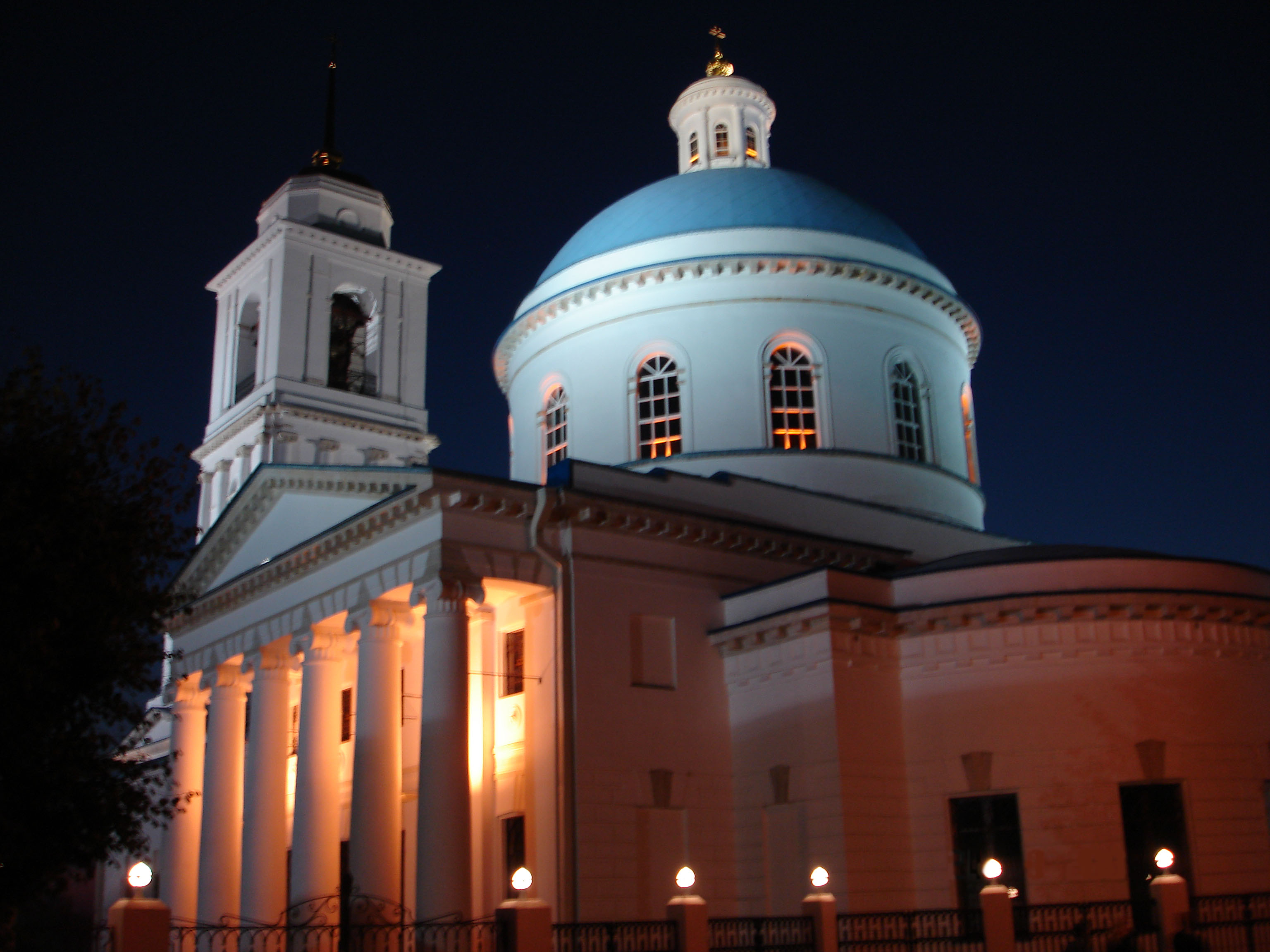 Кафедральный собор Николы Белого, г. Серпухов Категория:Серпухов